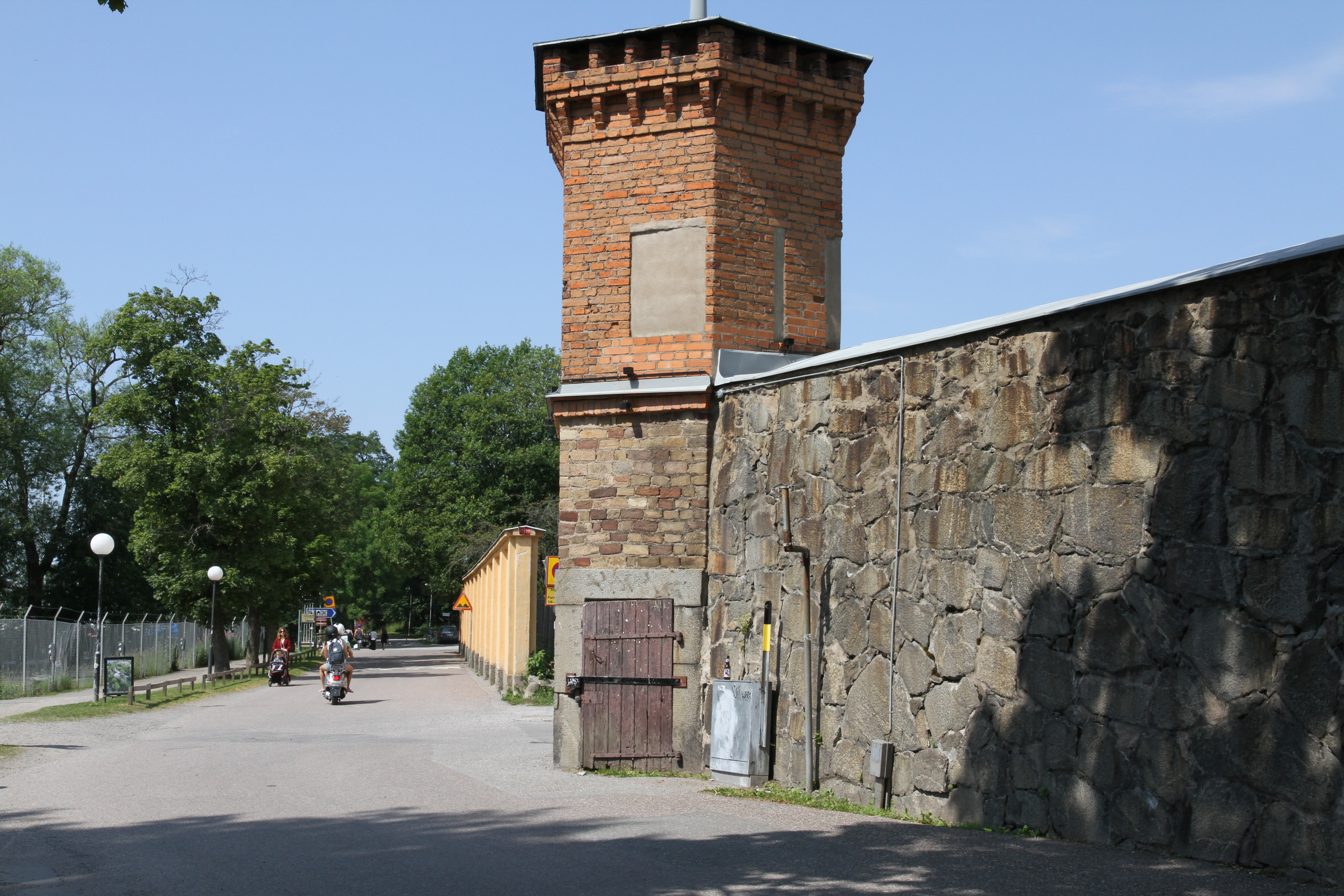 Kronohäktet, Långholmen, Stockholm 4 juli 2015. Vakttorn.